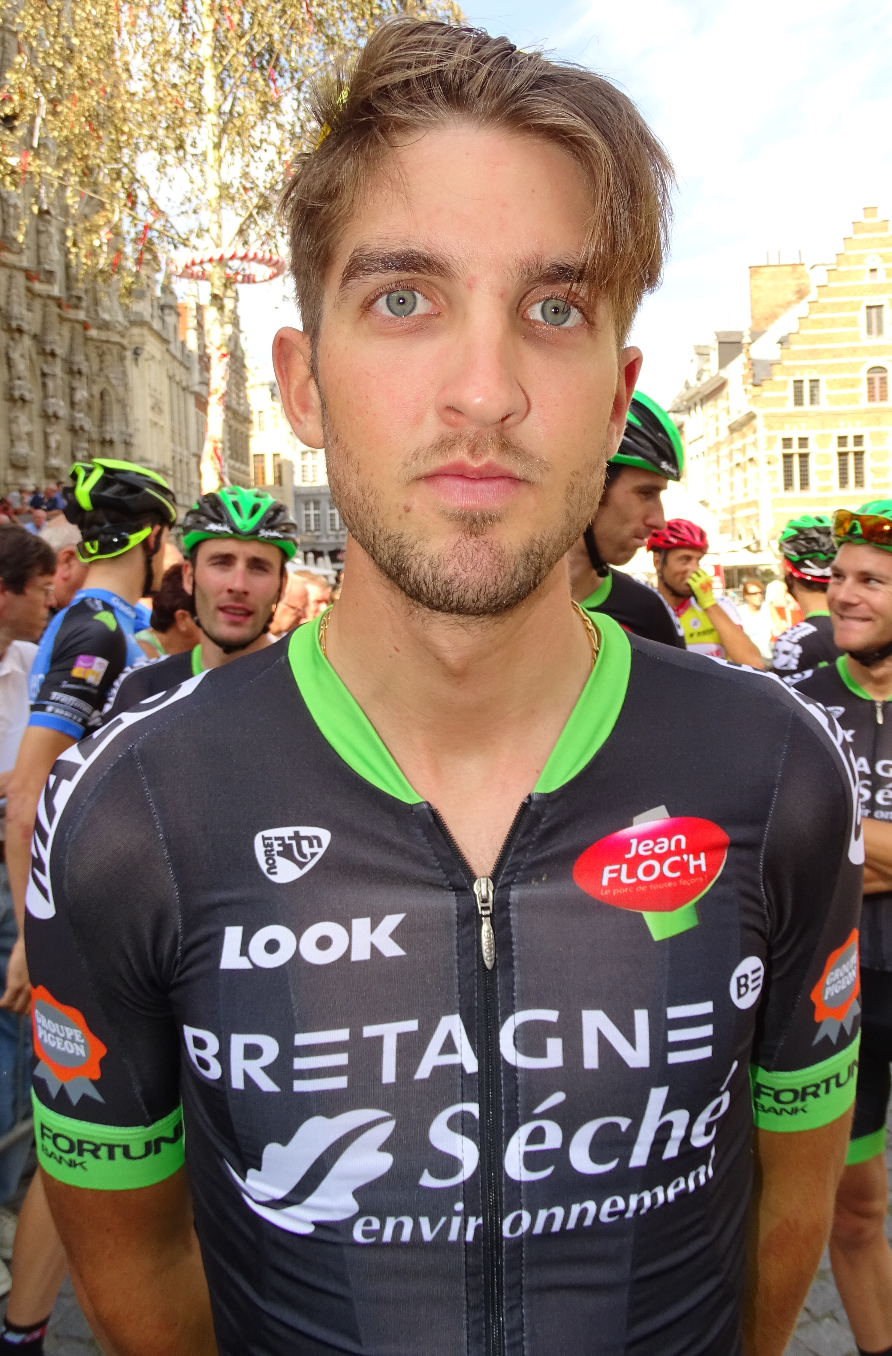 Reportage réalisé le dimanche 23 août à l'occasion du départ et de l'arrivée du Grand Prix Jef Scherens 2015 à Louvain, Belgique.